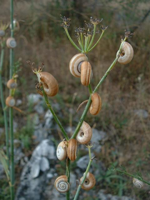 Escargots, Boutx